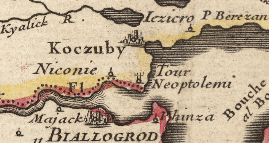 Коцюбіїв на мапі 1703 р. П’єра Дюваля "Composite: Le course du Danube"